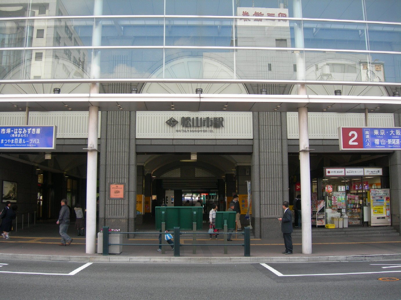 伊予鉄道松山市駅